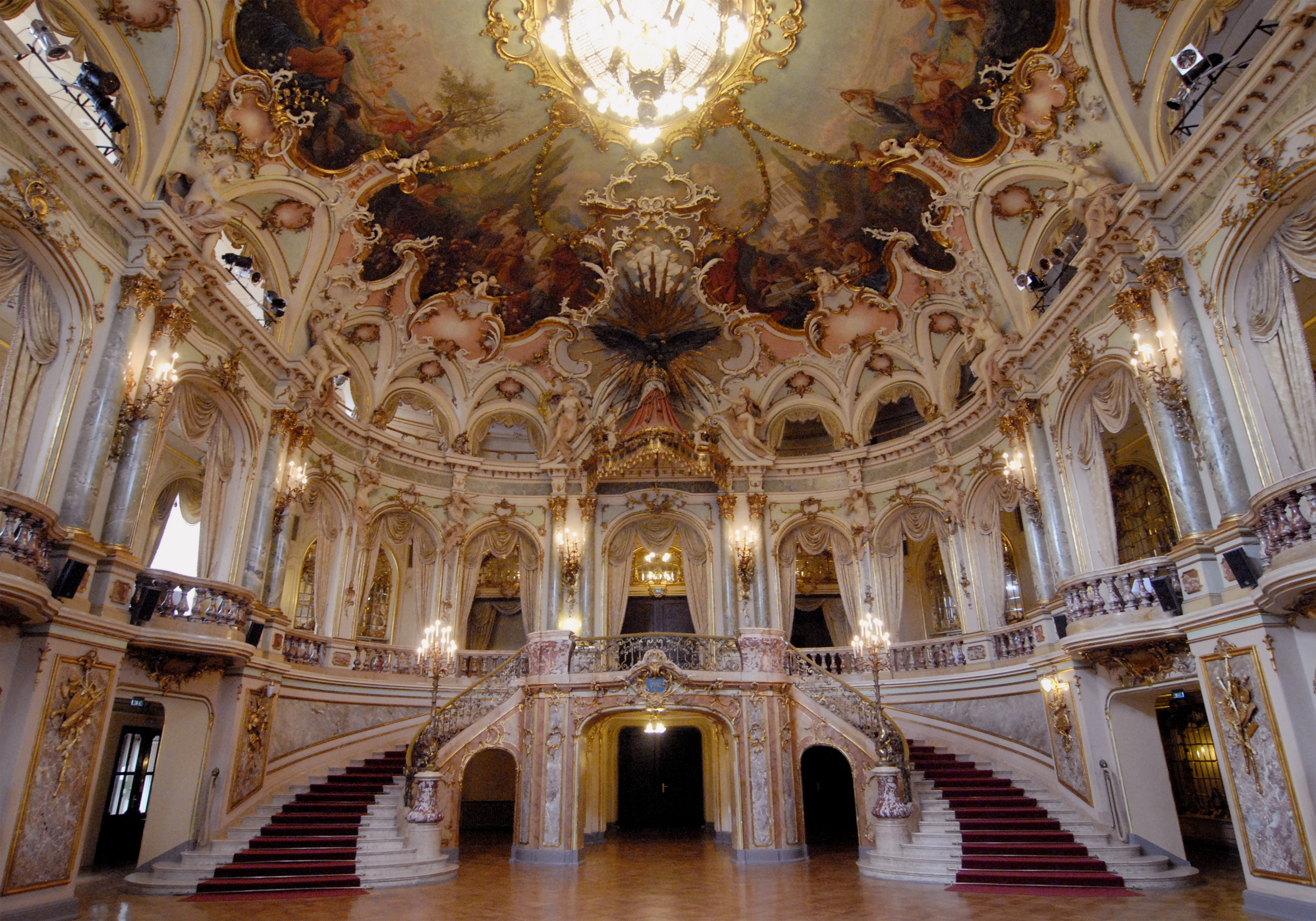 Hessisches Staatstheater Wiesbaden